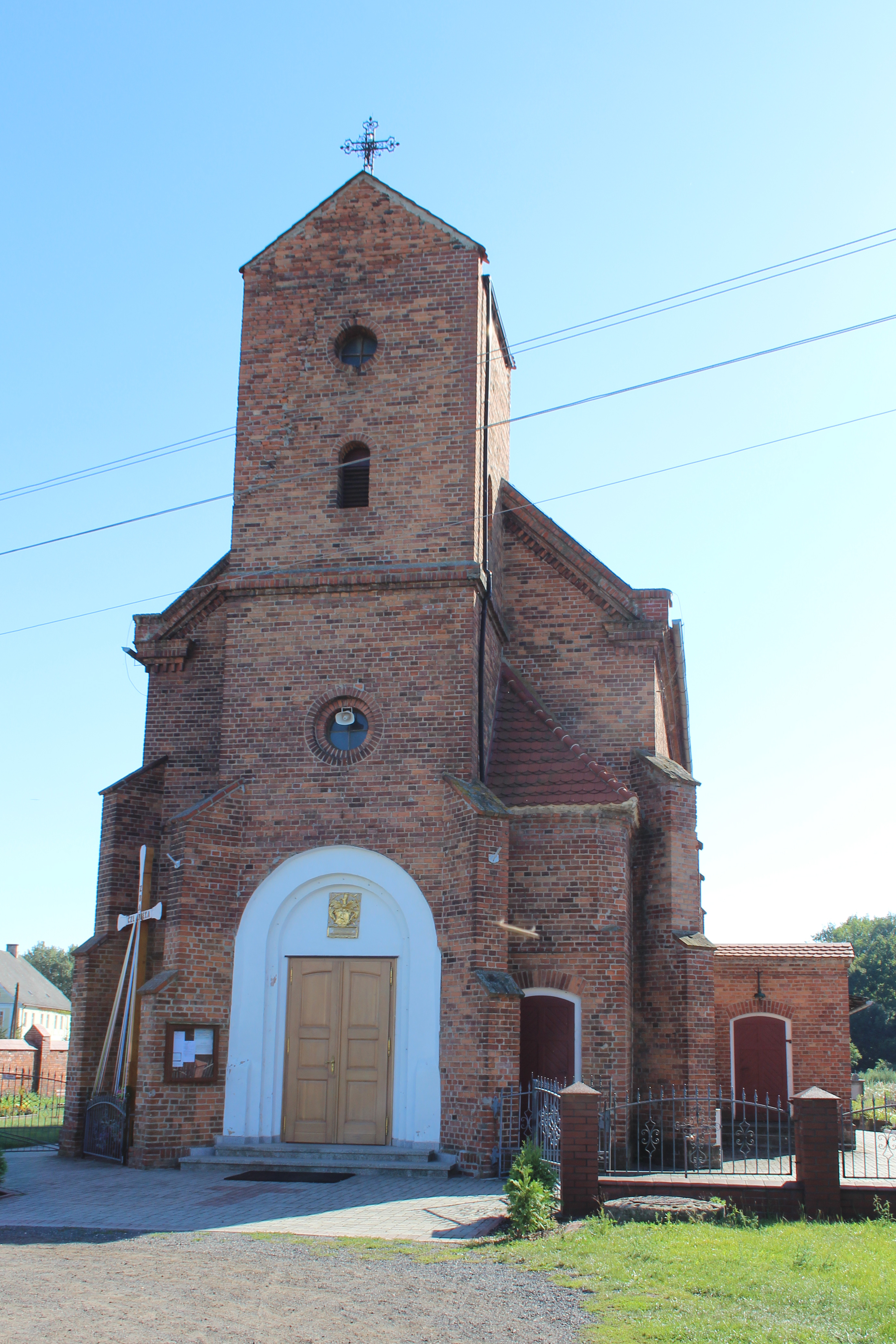 Krasna Góra - rzymskokatolicki kościół filialny p.w. Macierzyństwa NMP, 1826